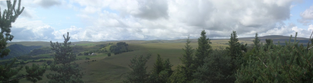 Panorama sur le cézallier